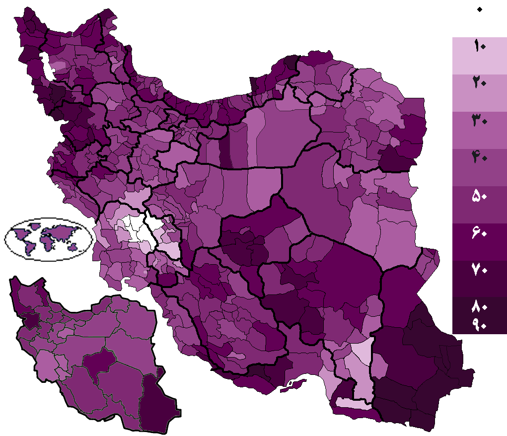 درصد رای حسن روحانی در انتخابات ریاست‌جمهوری ایران (۱۳۹۲) به تفکیک شهرستان Provinces of Iran